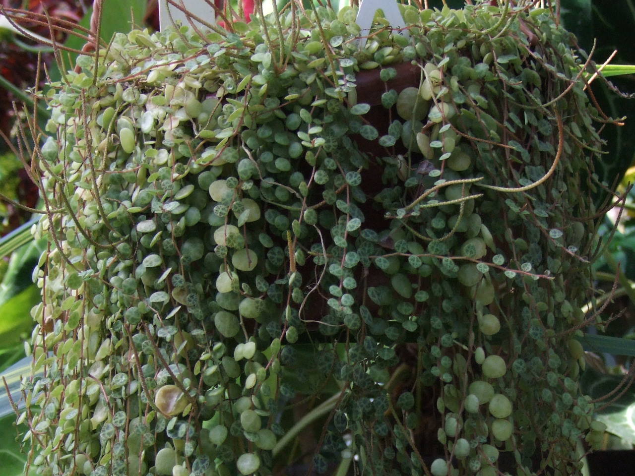 Peperomia prostrata (in Botanical Garden Kraków)